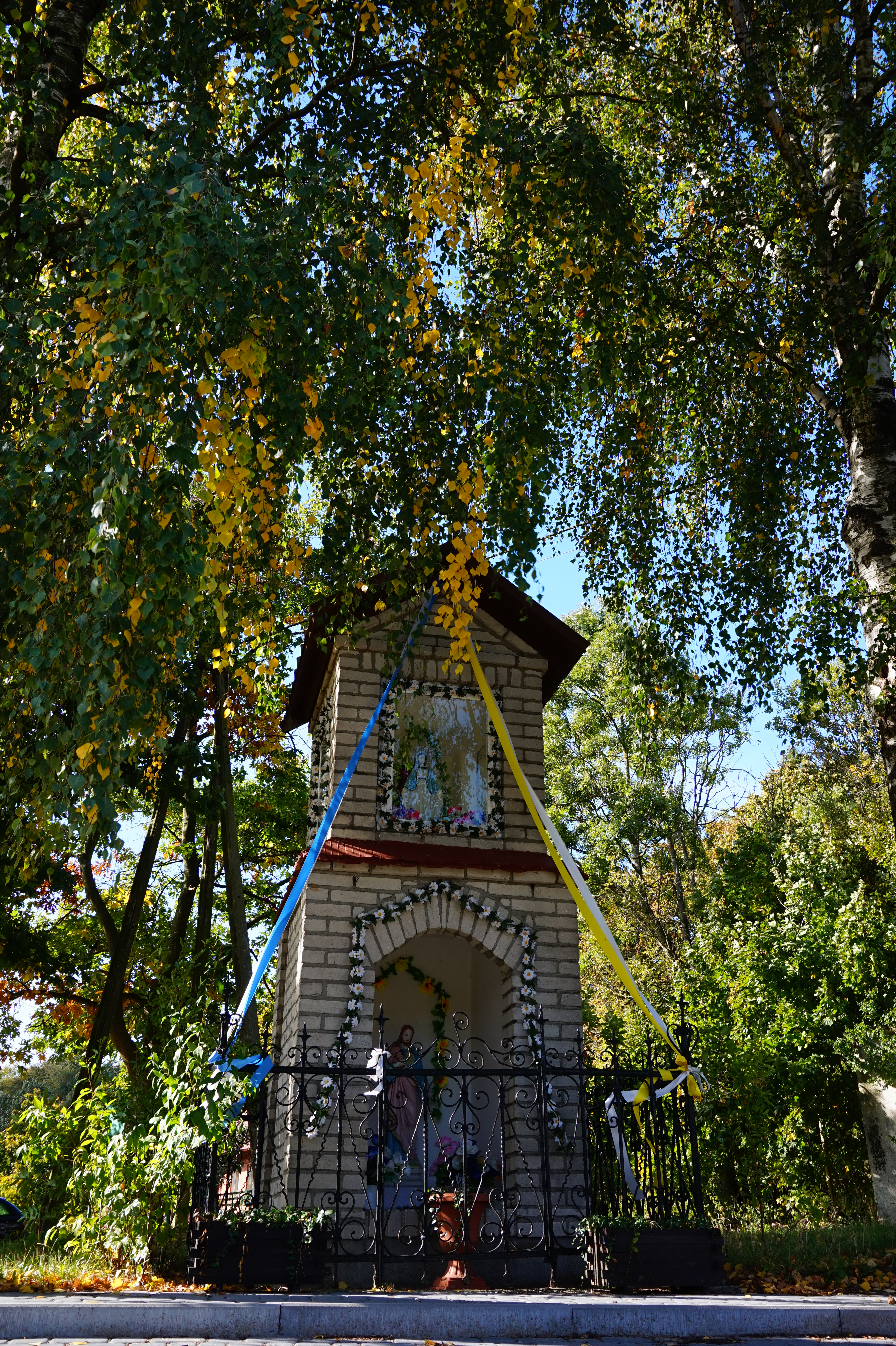 Kapliczka we wsi Drzewina